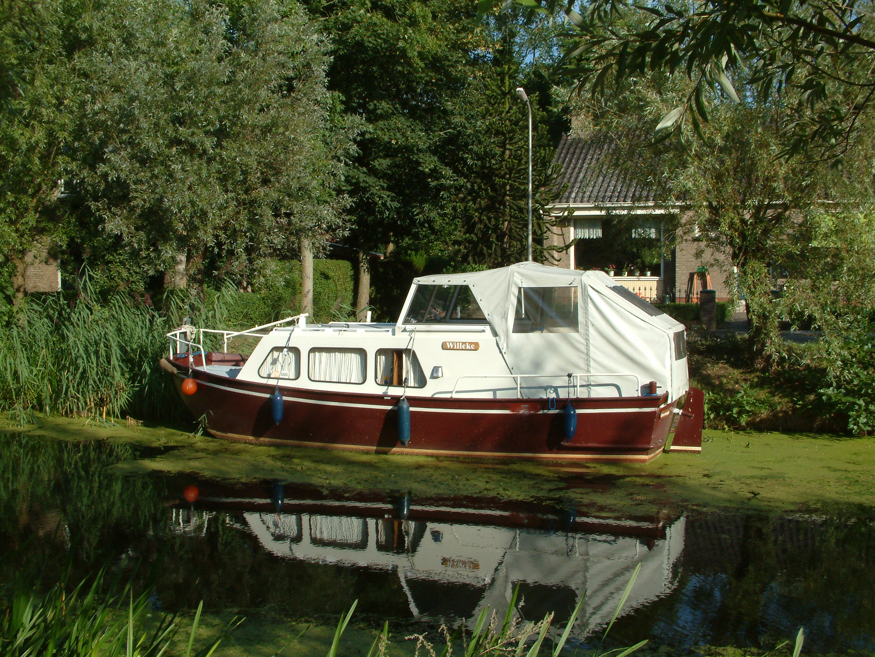 Doerak 700 op de Graafstroom in Gijbeland